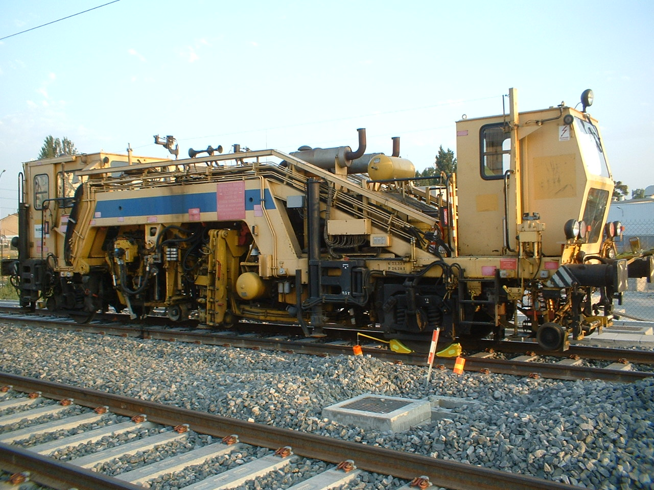 Bourreuse, sur chantier LEA à Lyon